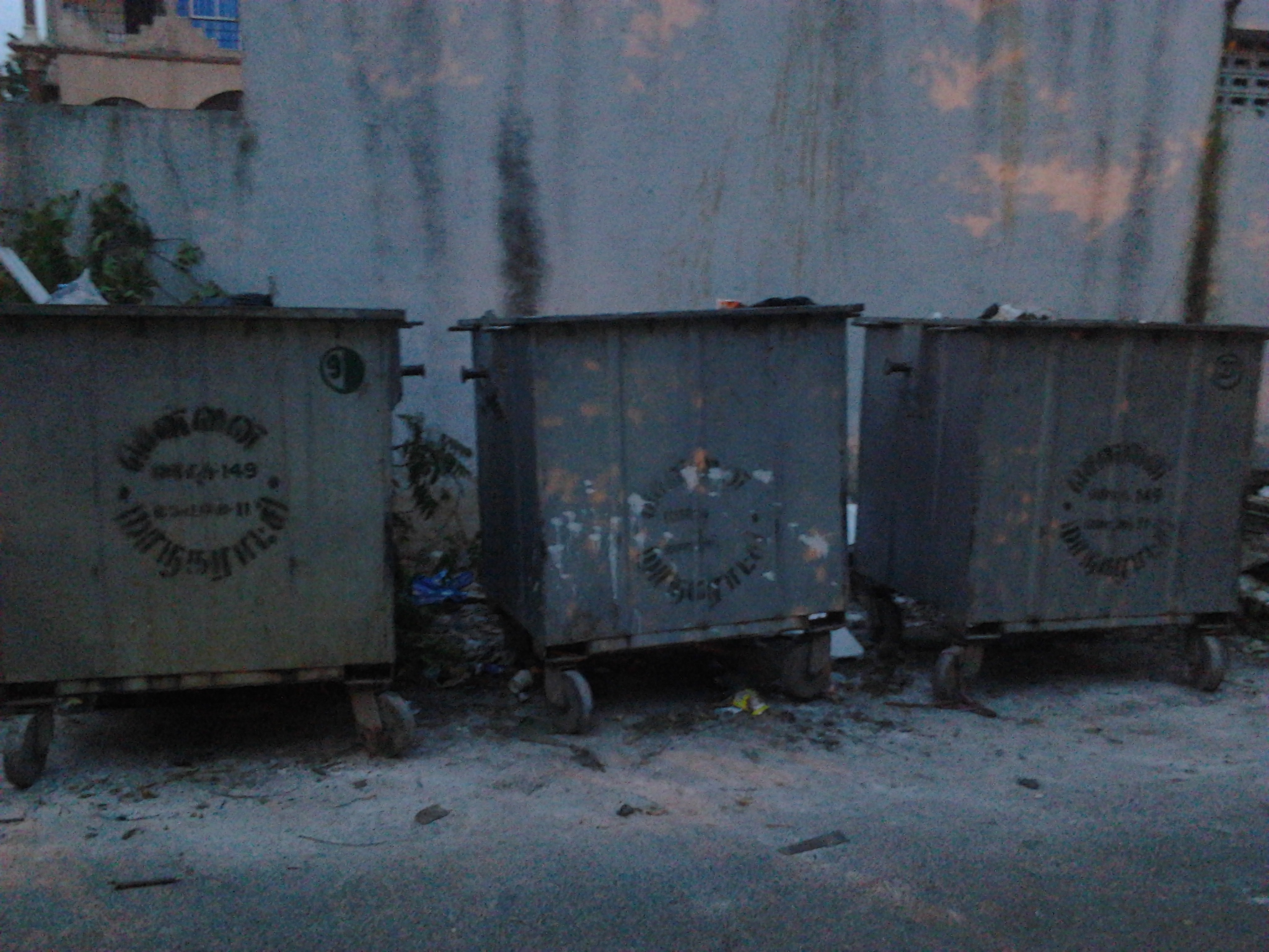 Chennai corporation dust bin